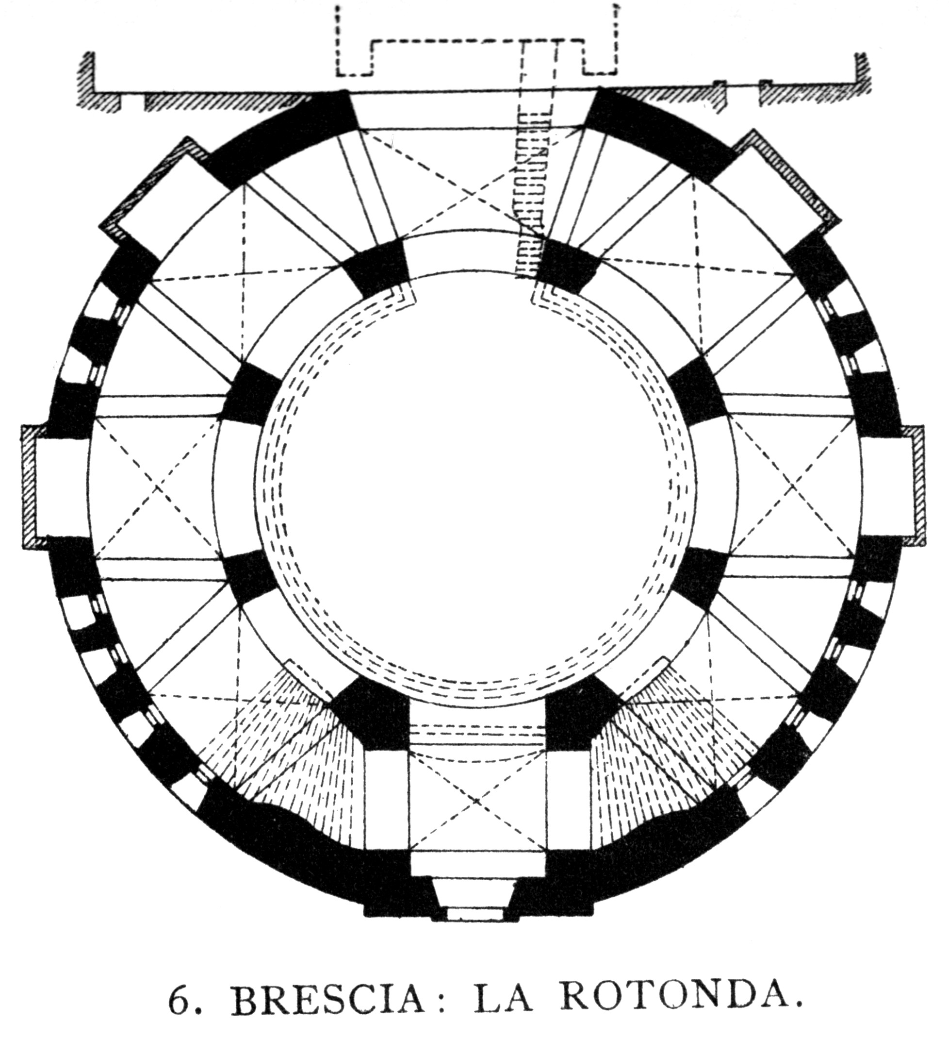 Brescia, La Rotonda, floor plan.